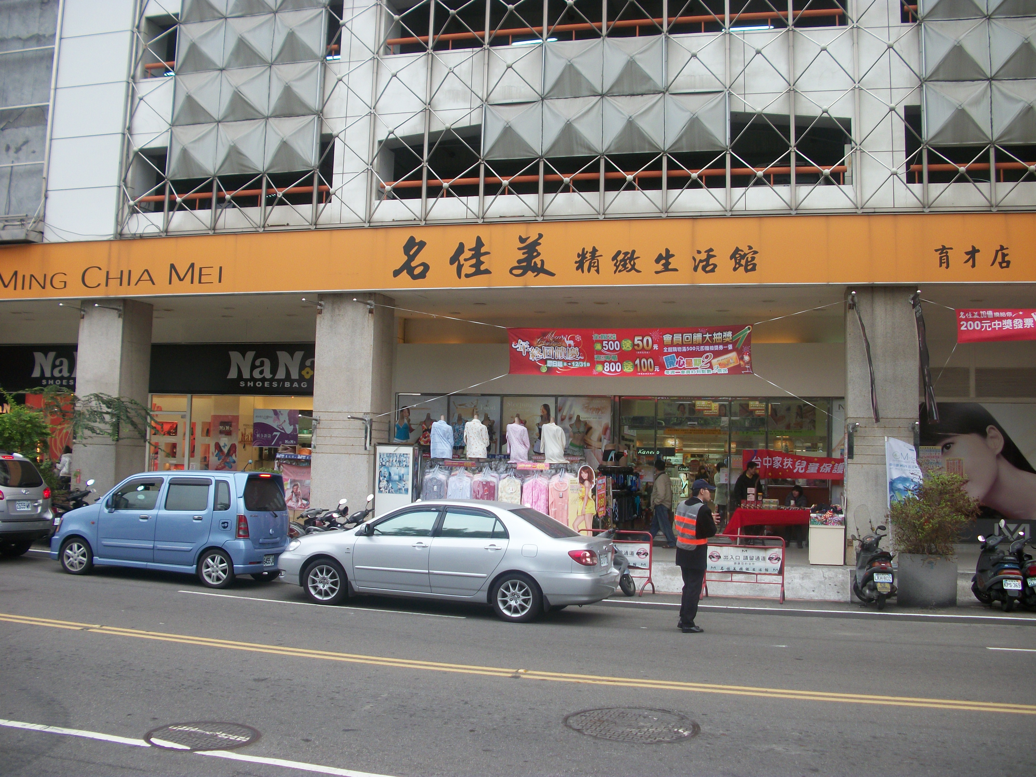 中文（台灣）: 名佳美育才店，地址：臺中市北區育才北路69號1樓。